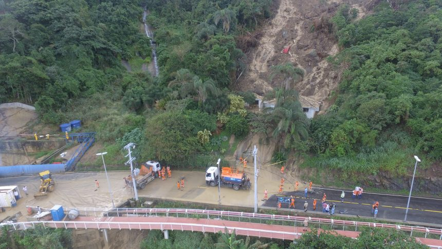 Vista aérea do deslizamento de terra ocorrido sobre a Avenida Niemeyer em maio de 2019.